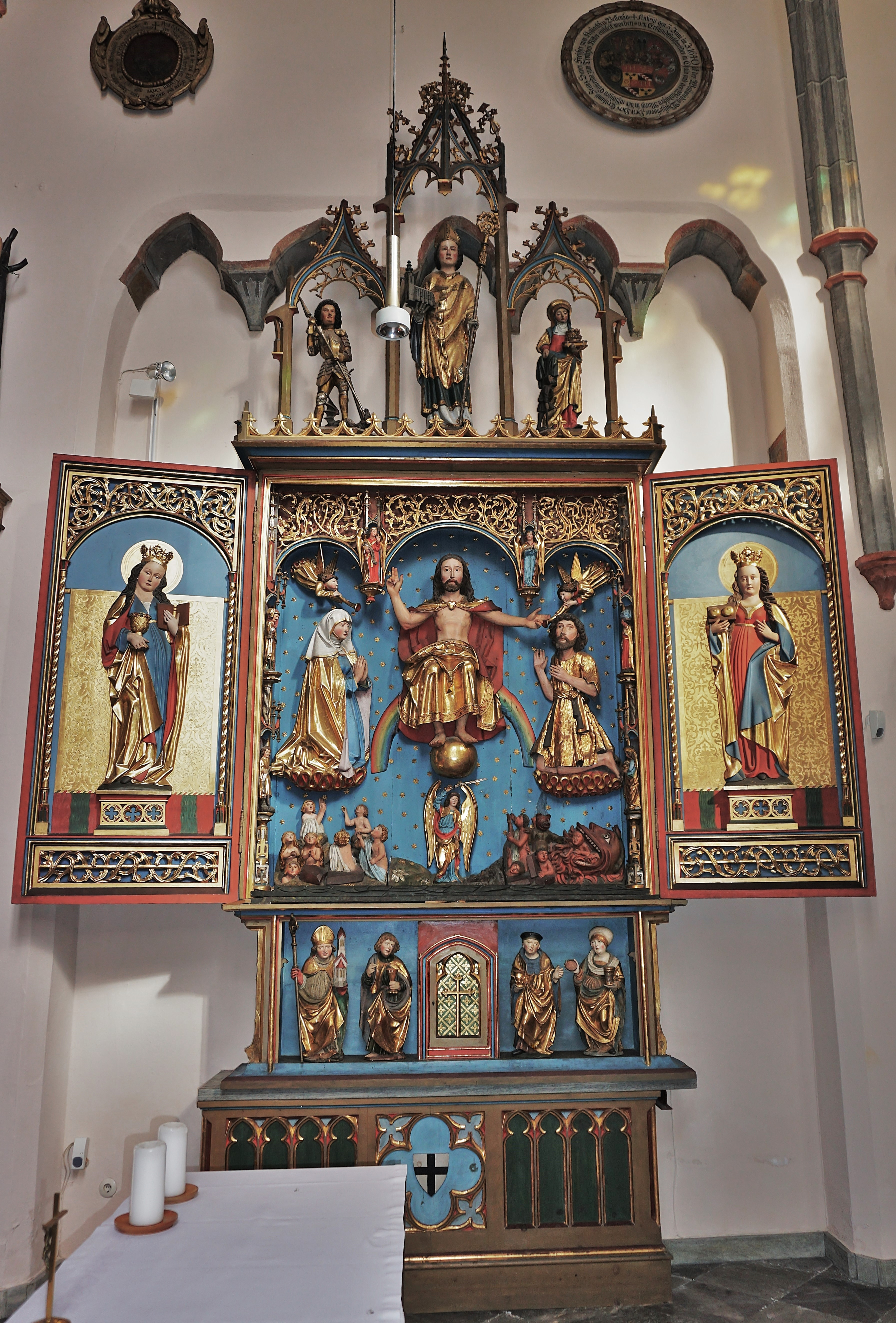 Deutschordenskirche (Friesach), Frankfurter Altar